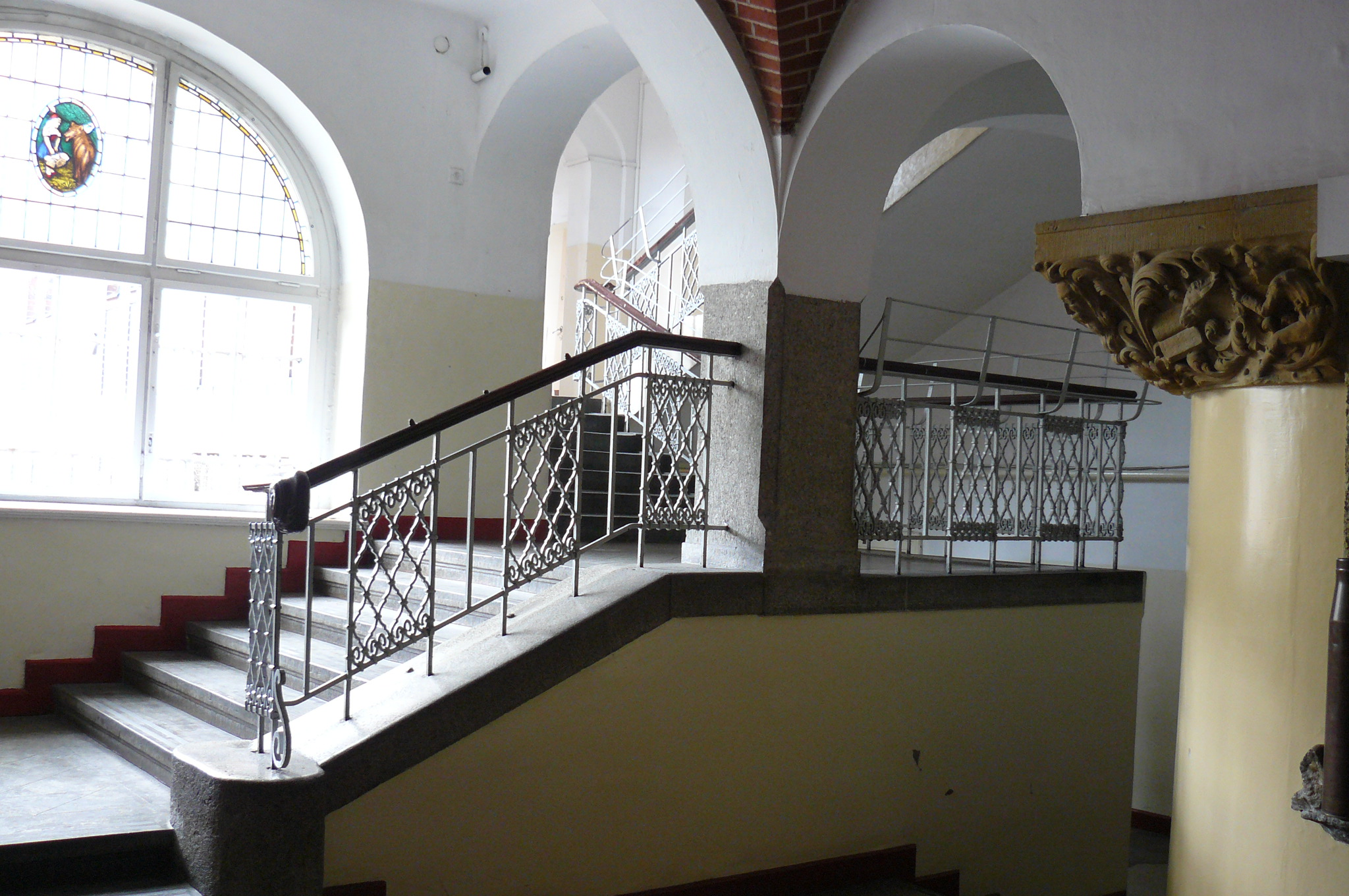 Szkołą przy ul. Słowackiego 54/60 w Poznaniu.